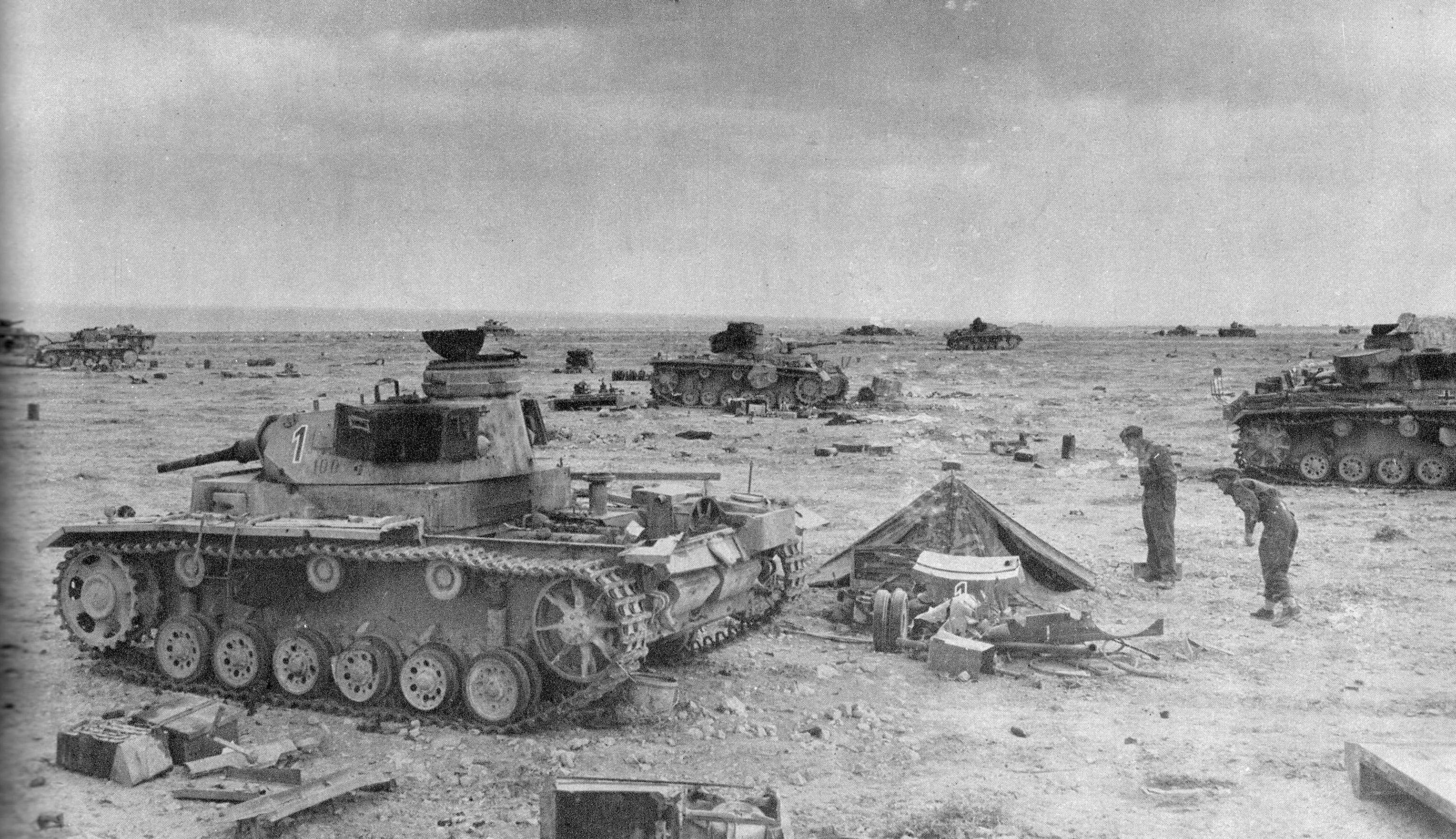 Battlefield remains at Sidi Regez, Western Desert, 1941